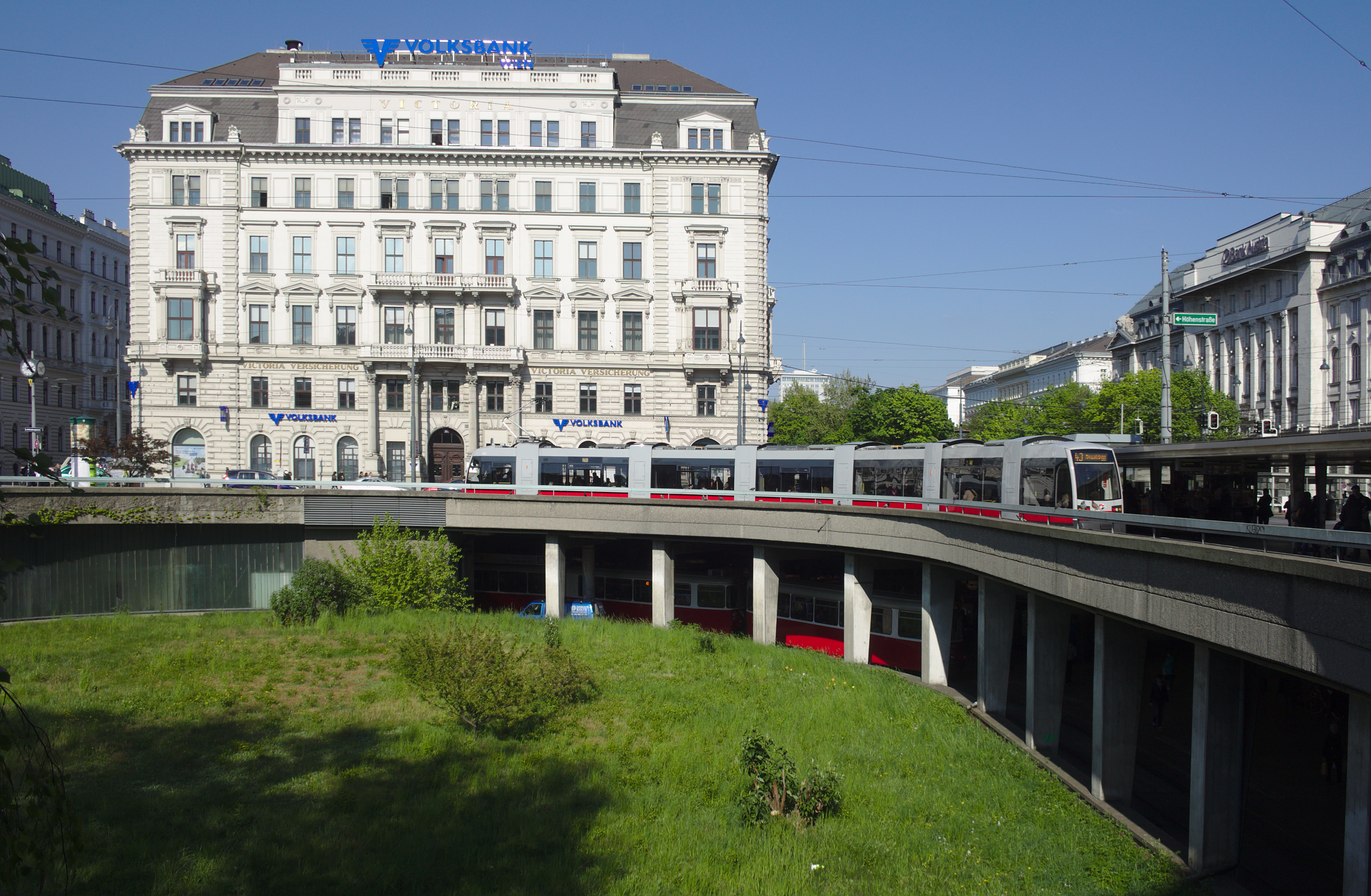 Schottentorpassage und Schleife Schottentor, sog. Jonasreindl